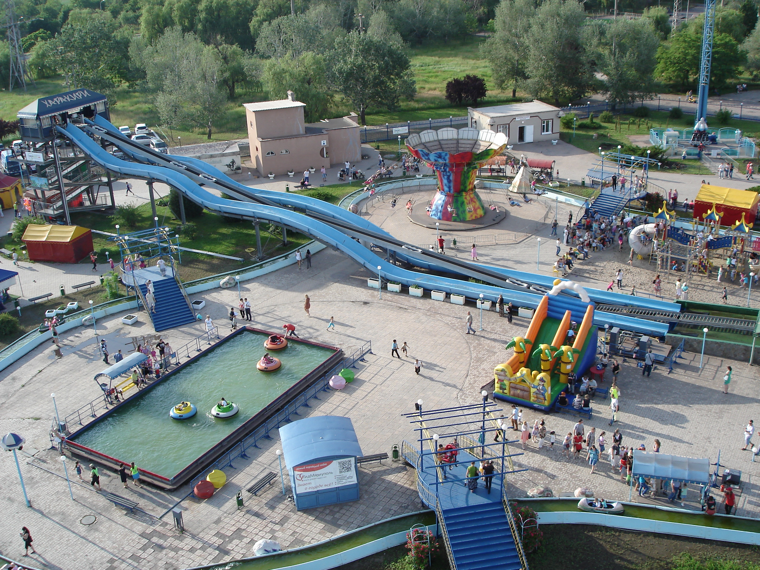 Экстрим-парк вид с колеса обозрения